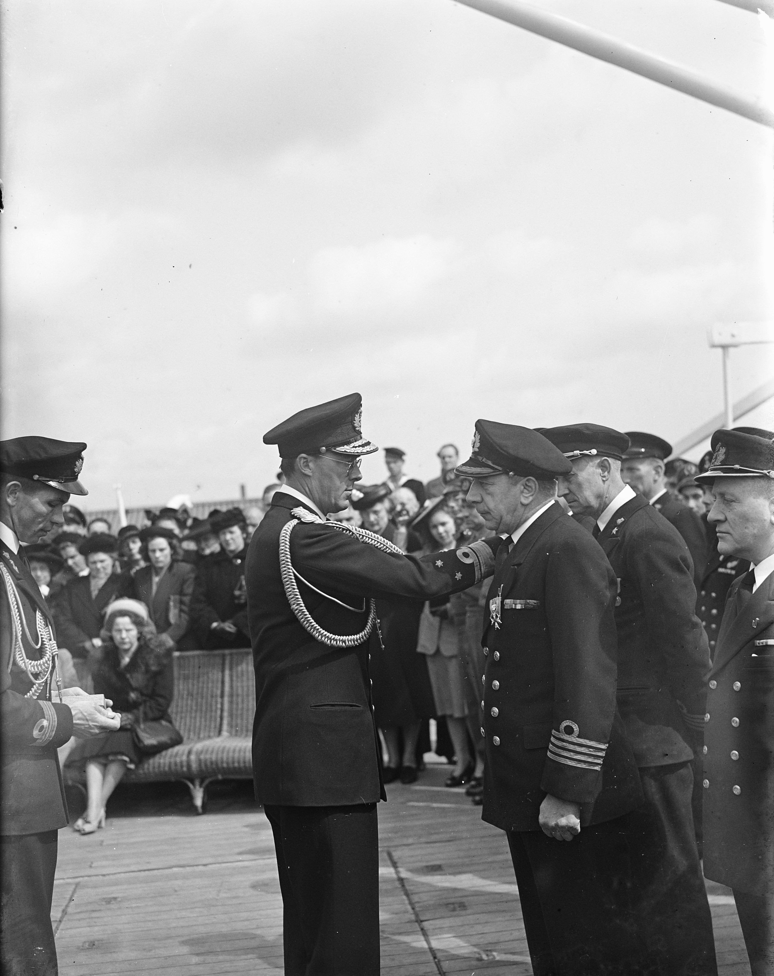 Collectie / Archief : Fotocollectie Anefo Reportage / Serie : [ onbekend ] Beschrijving : Prins Bernhard reikt onderscheidingen uit. Kaptein Romein Datum : 2 mei 1948 Trefwoorden : onderscheidingen Persoonsnaam : Bernhard, prins, Romein, Arie Fotograaf : Lindeman, […] / Anefo Auteursrechthebbende : Nationaal Archief Materiaalsoort : Glasnegatief Nummer archiefinventaris : bekijk toegang 2.24.01.09 Bestanddeelnummer : 902-7211 Reacties Geplaatst door Maaike op 27 augustus 2014 - 09:53. Benoeming tot Ridder der militaire Willemsorde vierde klasse, kapitein van het schip de ms 'Oranjefontein' Plaats: Amsterdam, Noord-Holland